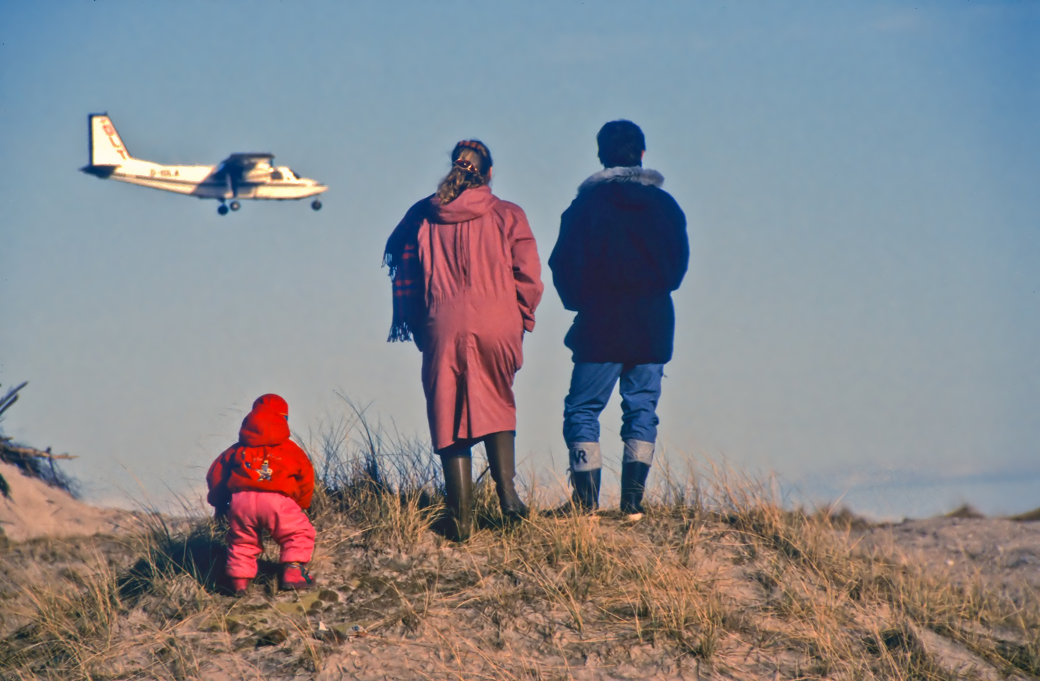 Schnappschuss mit Flugzeug auf Helgoland